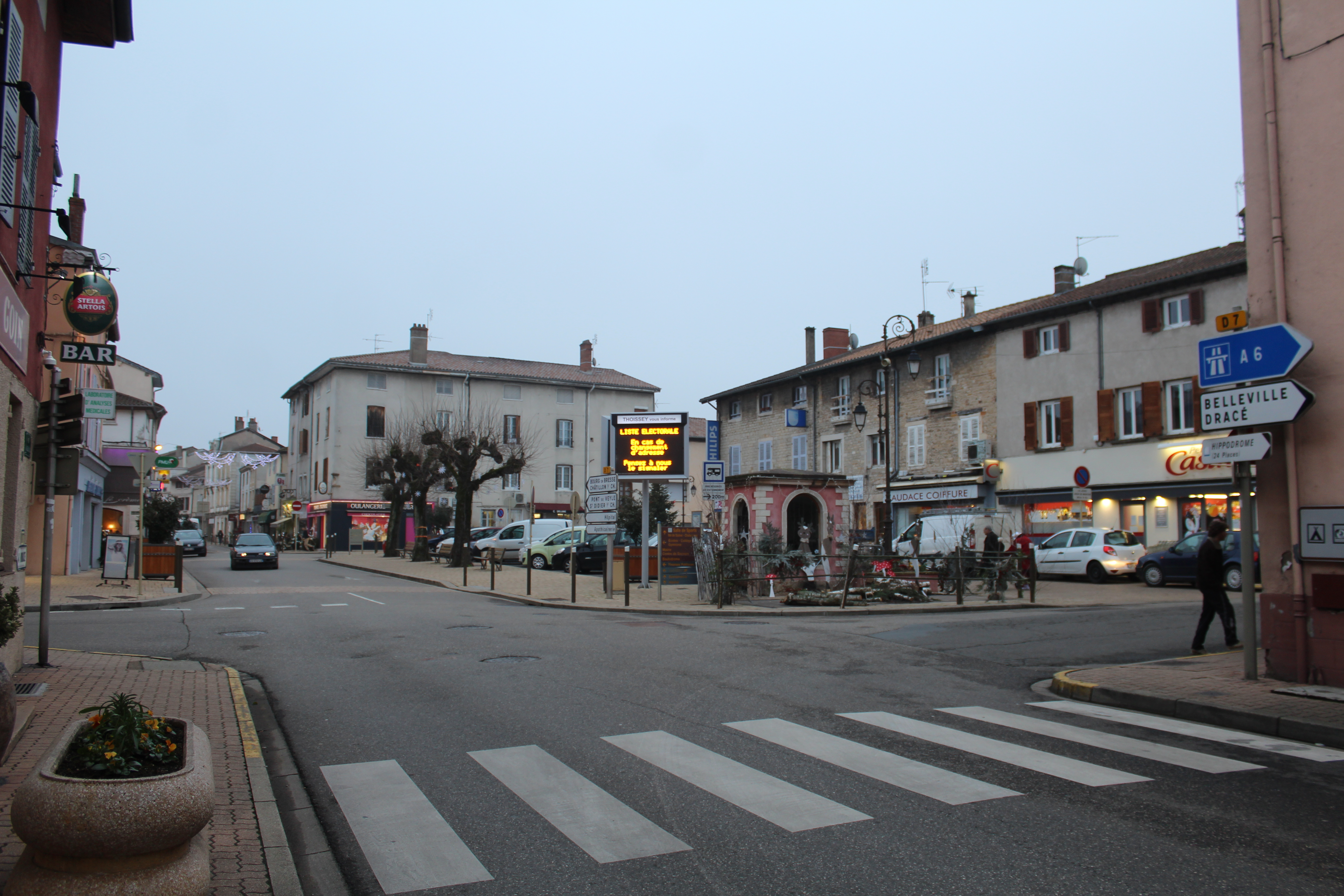 Place du Collège Royal de Thoissey.